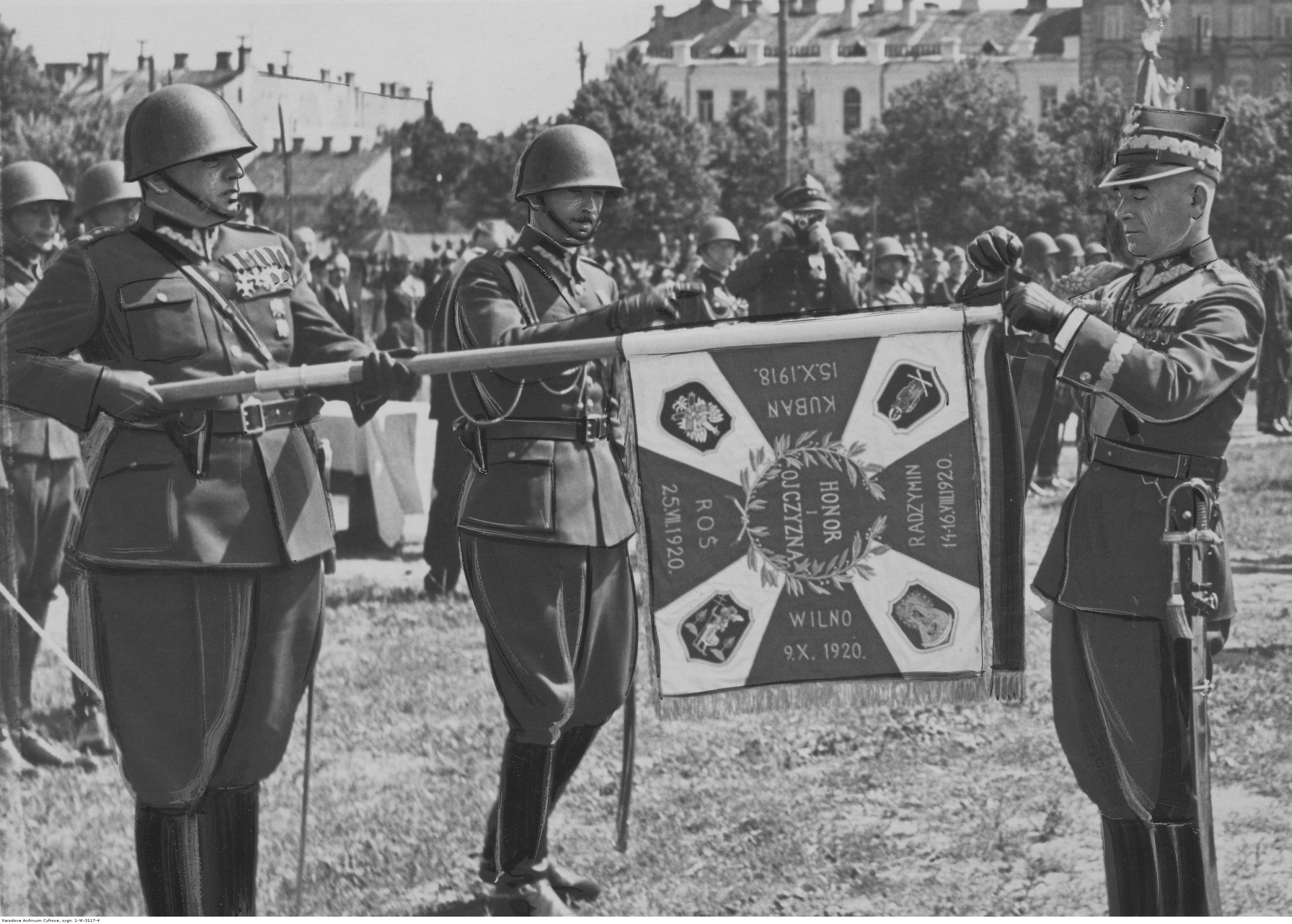 Wręczenie sztandarów ufundowanych przez ludność ziemi wileńskiej pułkom artylerii w Wilnie 3 lipca 1938. Marszałek Edward Rydz-Śmigły przypina szarfę do sztandaru 19 Pułku Artylerii Lekkiej. Koncern Ilustrowany Kurier Codzienny - Archiwum Ilustracji. Sygnatura: 1-W-3117-4